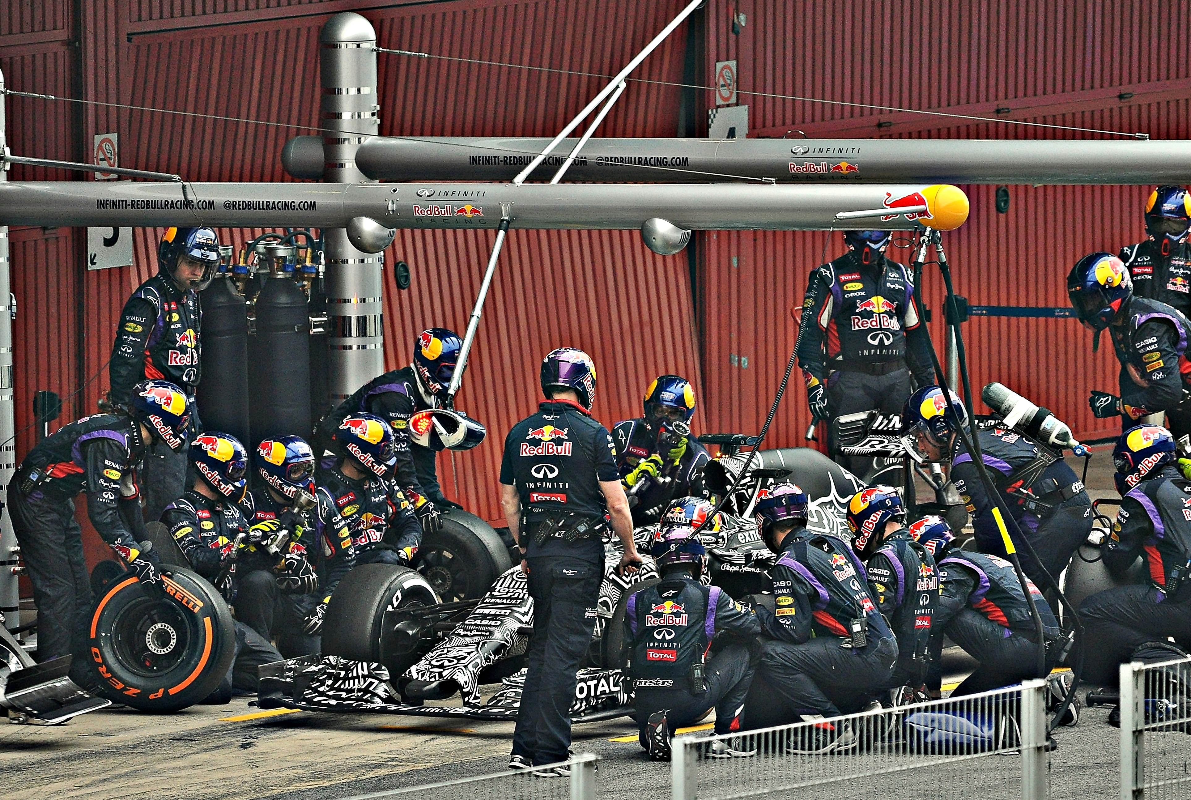 Test days Barcelona 2015